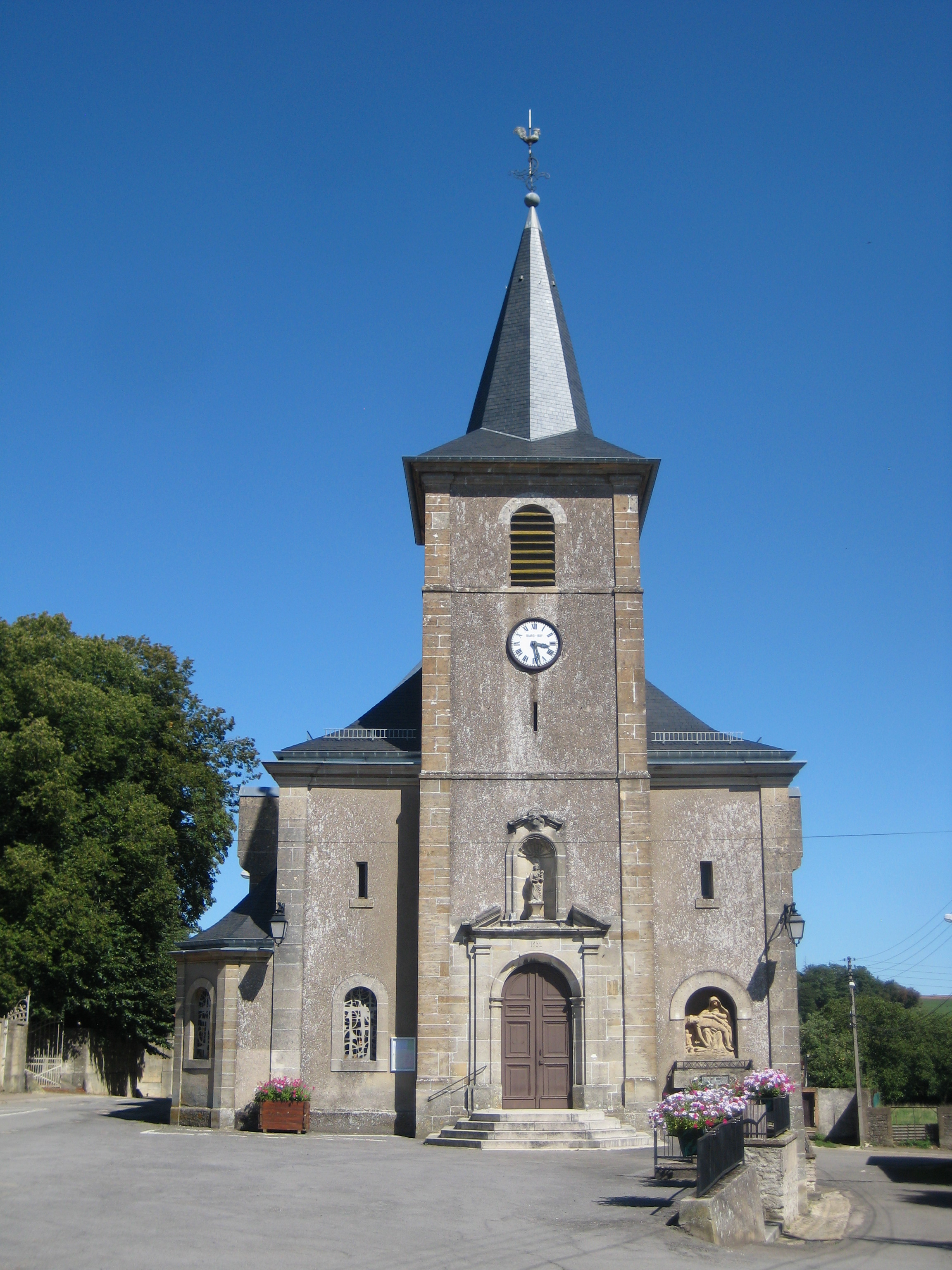 Description Église paroissiale Notre-Dame-de-la-Nativité Boulange Date25 August 2011Sourcemon appareil photoAuthorAimelaimePermission(Reusing this file) Église paroissiale Notre-Dame-de-la-Nativité Boulange